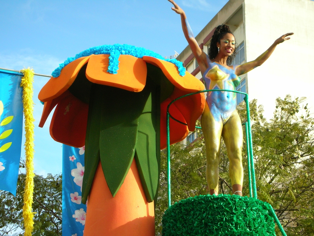 Loulé Carnival Valter Jacinto